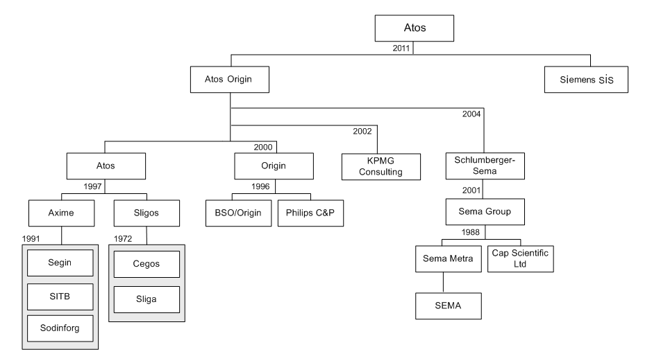 Organigramme réalisé personnellement d'après l'organigramme présent sur le site d'Atos Origin.